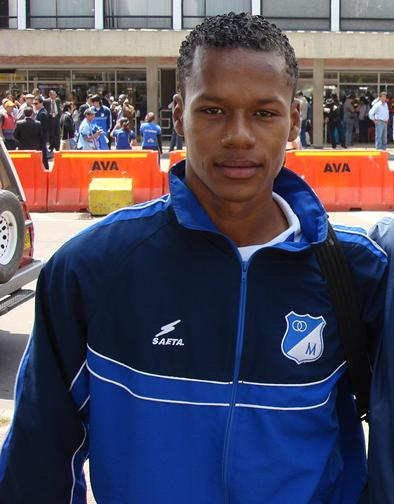 Alex ´Diaz.Jugador de Millonarios